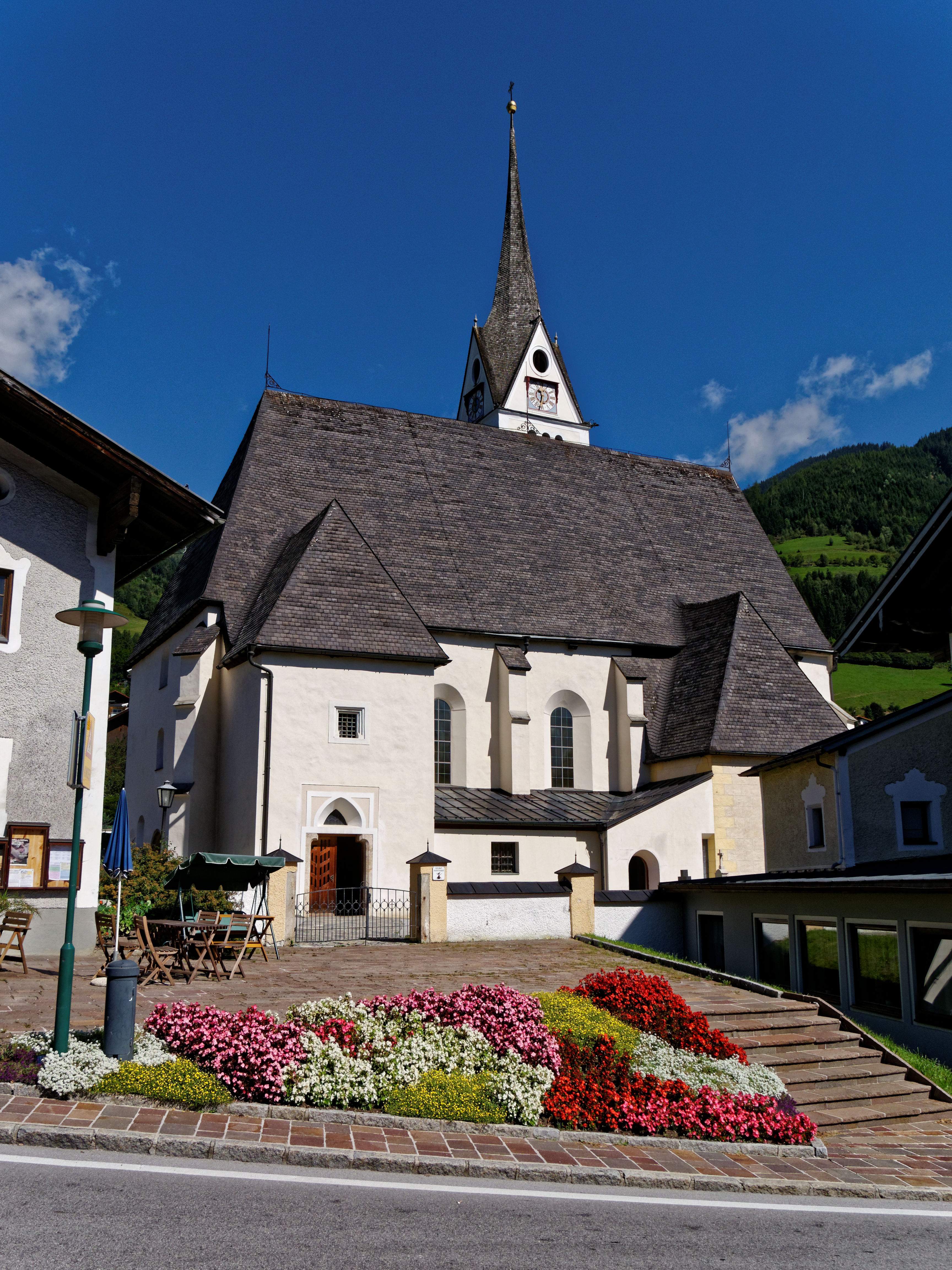 Südansicht der Pfarrkirche zum Hl. Laurentius in Piesendorf